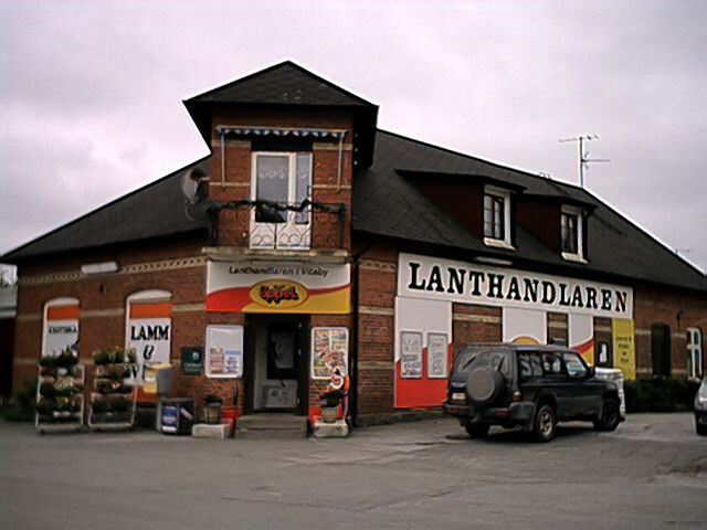 Vitaby lanthandel i Vitaby. Copyright: Väsk 2004